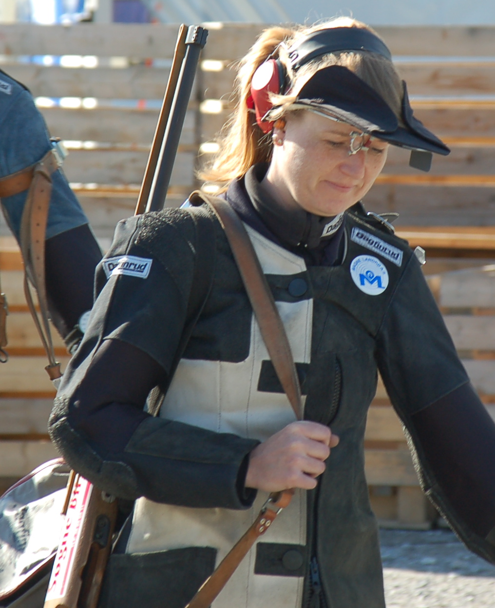 Mette Finnestad, skytterdronning 2006